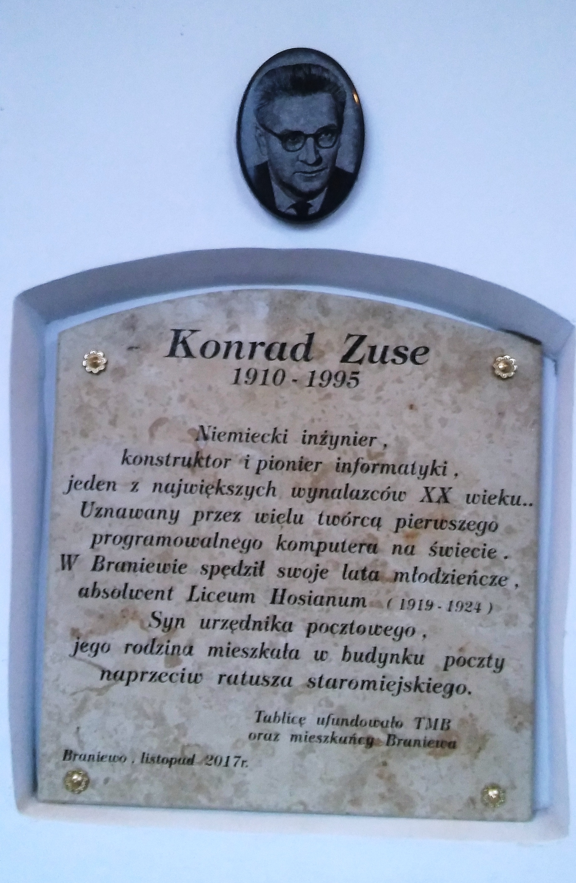 Konrad Zuse Kolegium Jezuitów w Braniewie Collegium Hosianum